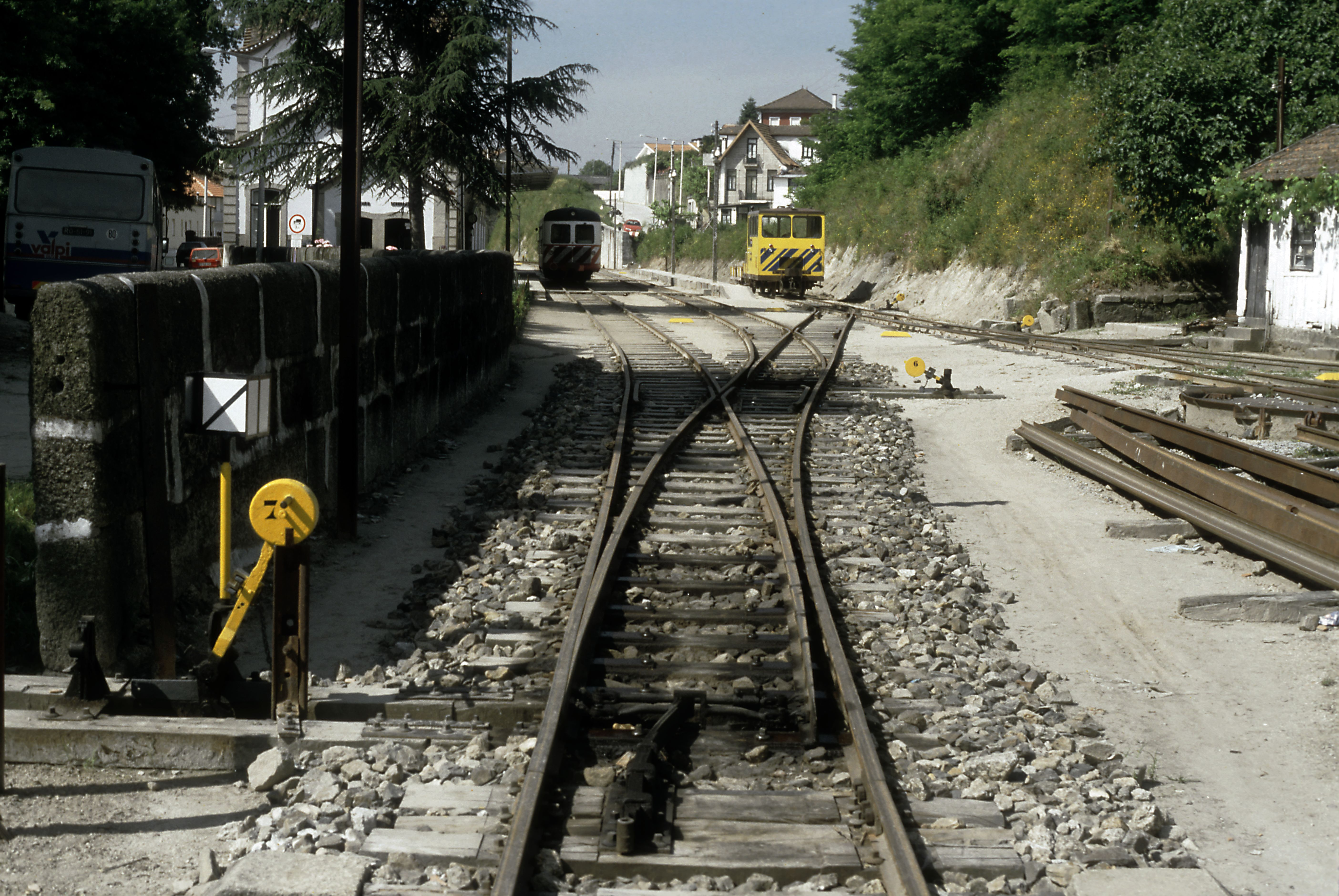 Bf Amarante